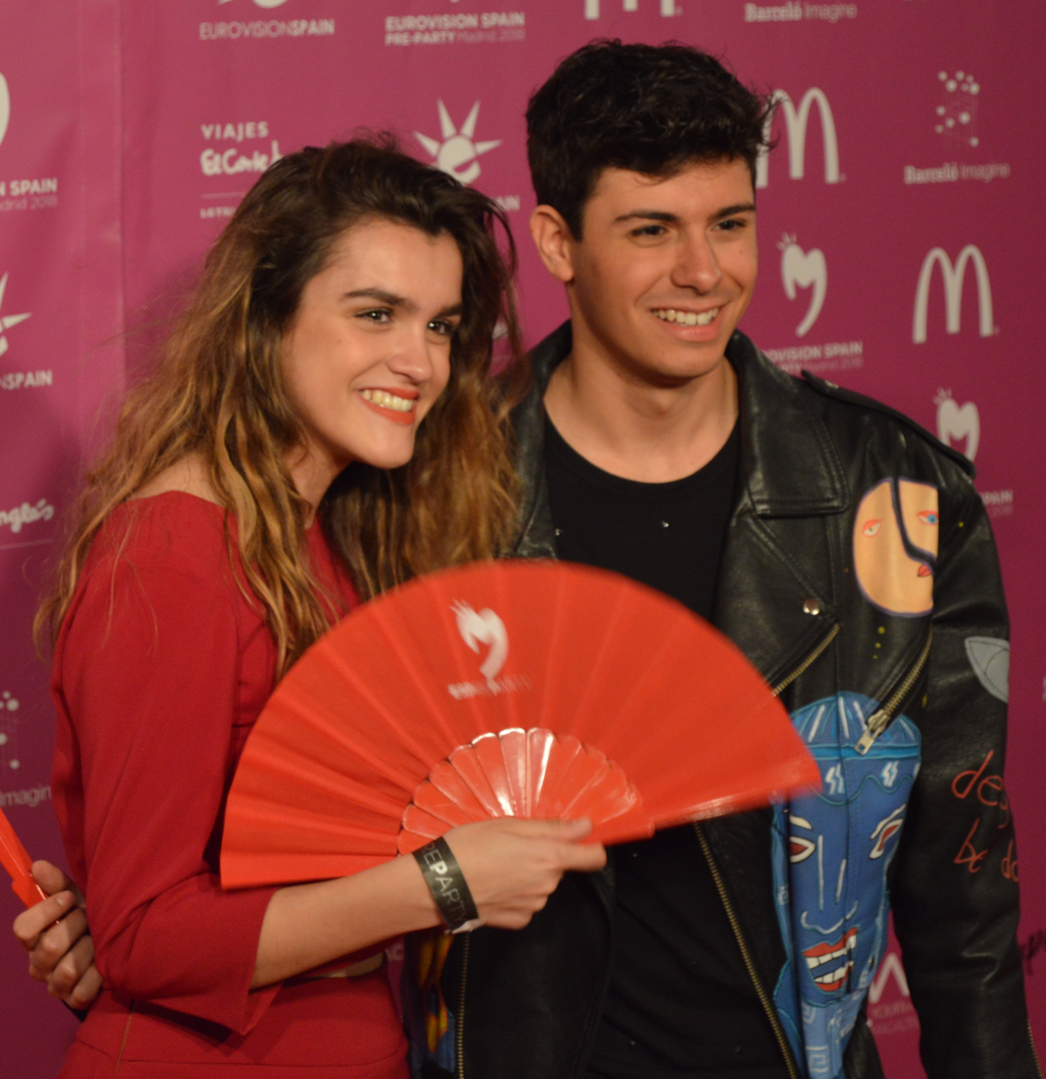 Alfred García y Amaia Romero posan para los medios en la Eurovision Spain PreParty en Madrid (Abril 2018)